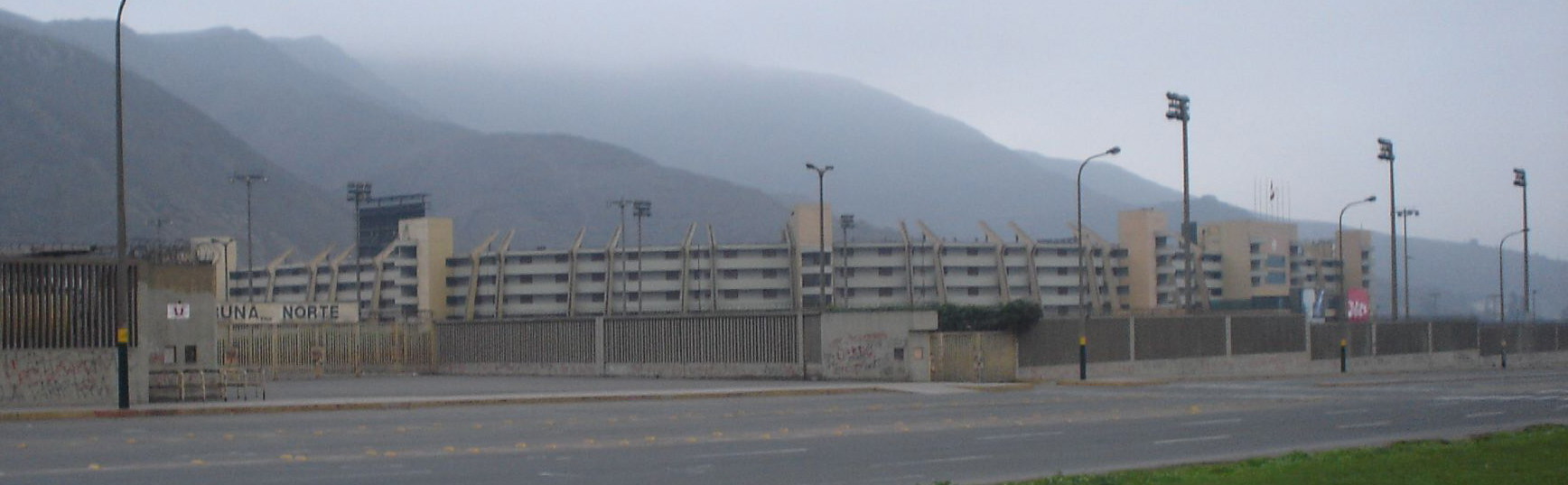 Outside the Estadio Monumental U on Av. Javier Prado